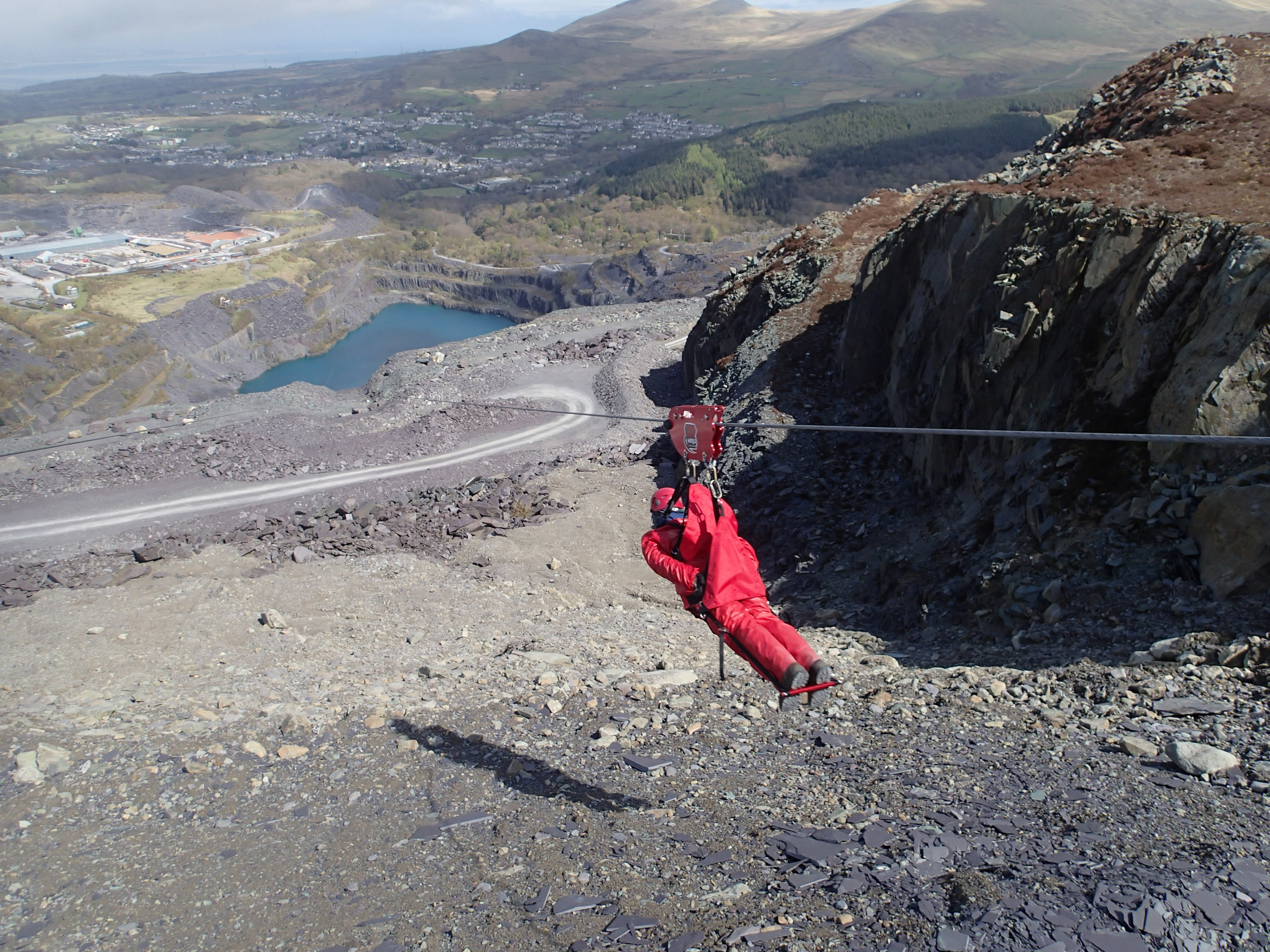 Zip World, Penrhyn Quarry, Bethesda, Bangor Gwynedd